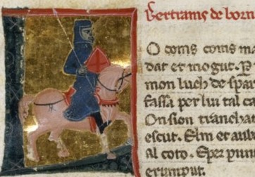 Bertrand de Born from BNF Français 12473